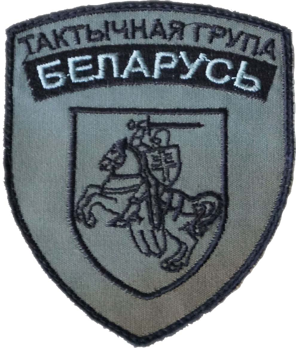 Беларуская (тарашкевіца): Шаўрон Тактычнай групы "Беларусь"